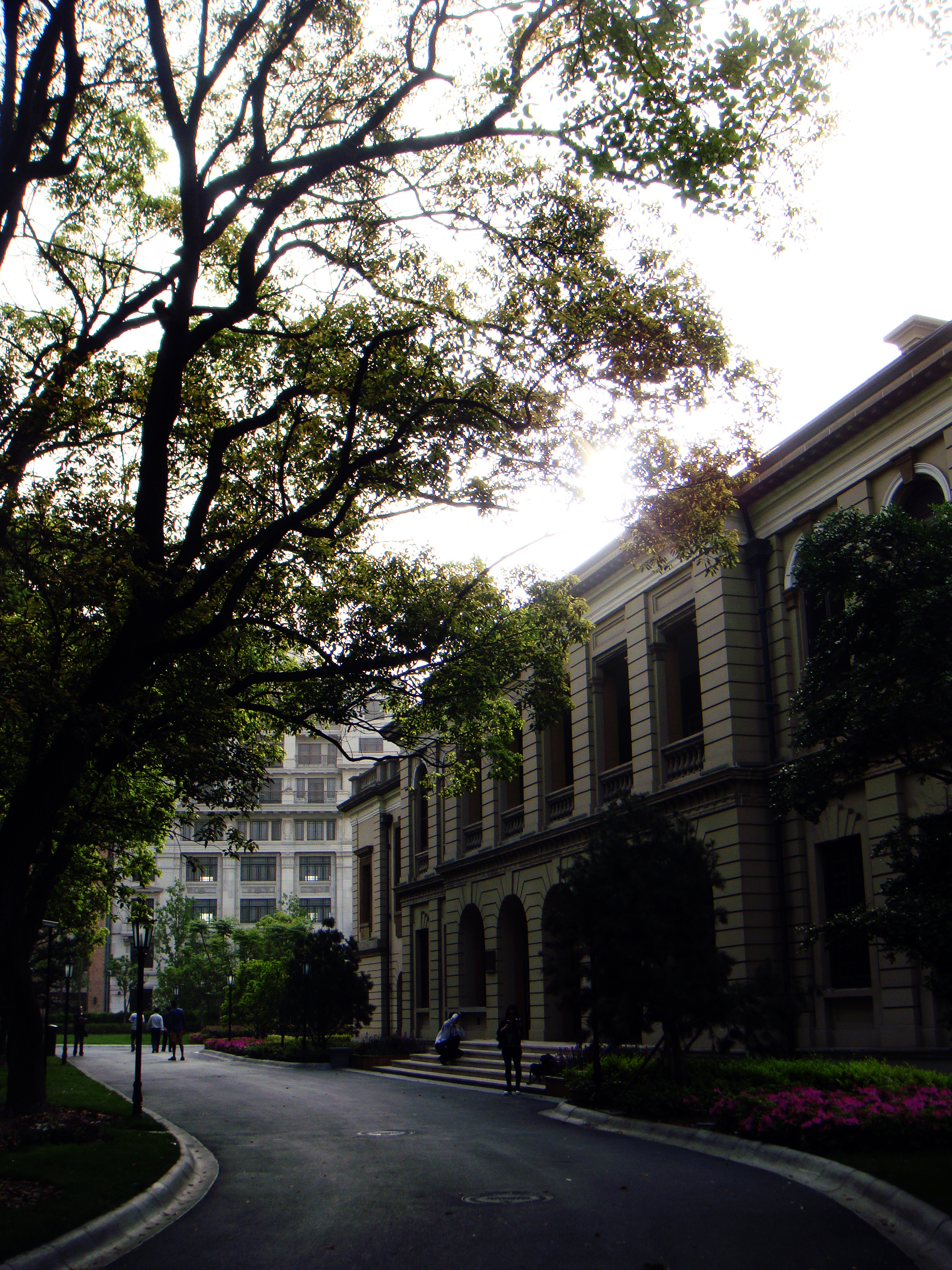 原联合王国驻上海总领事馆南侧正门